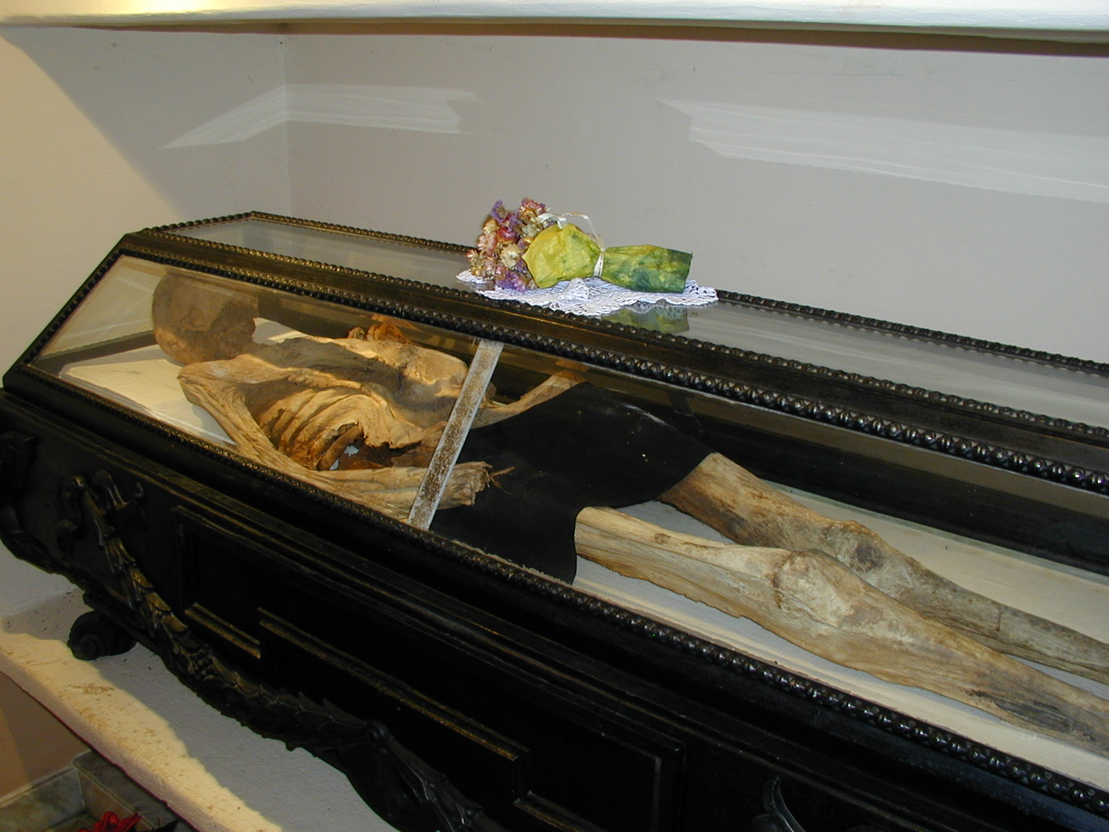 A kép egy lendvai szőlőhegyen levő templomban készült még 2006 nyarán. A templomban egy üvegfedelű koporsóban Hadik Mihály mumifikálódott holtteste látható. Hadik Lendvában a törökök ellen küzdött még a 17. században, az ő fia Hadik András. User:Doncsecz